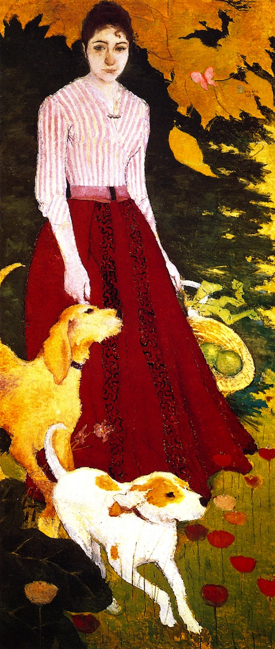 Paintings by Pierre Bonnard